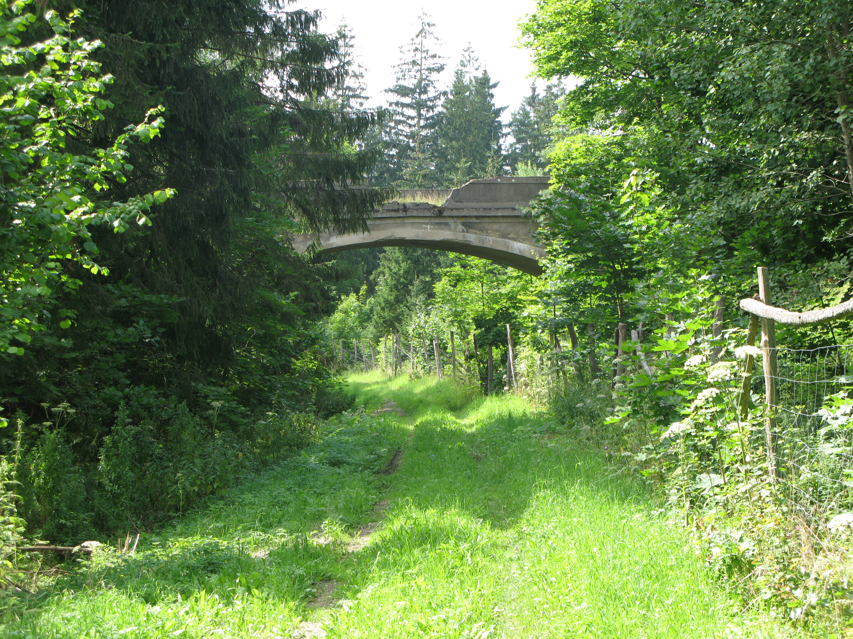 Puszcza Romincka, powiat gołdapski